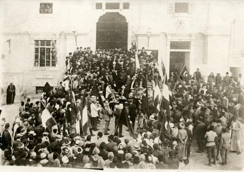 Eerste Wereldoorlog, Balkanfront. Patriotische betogingen ten gunste van de Centralen (de Duitse en Oostenrijkse-Hongaarse bondgenoten) op een der pleinen in Jaffa, Palestina (het huidige Tel Aviv, Israël), 1915.